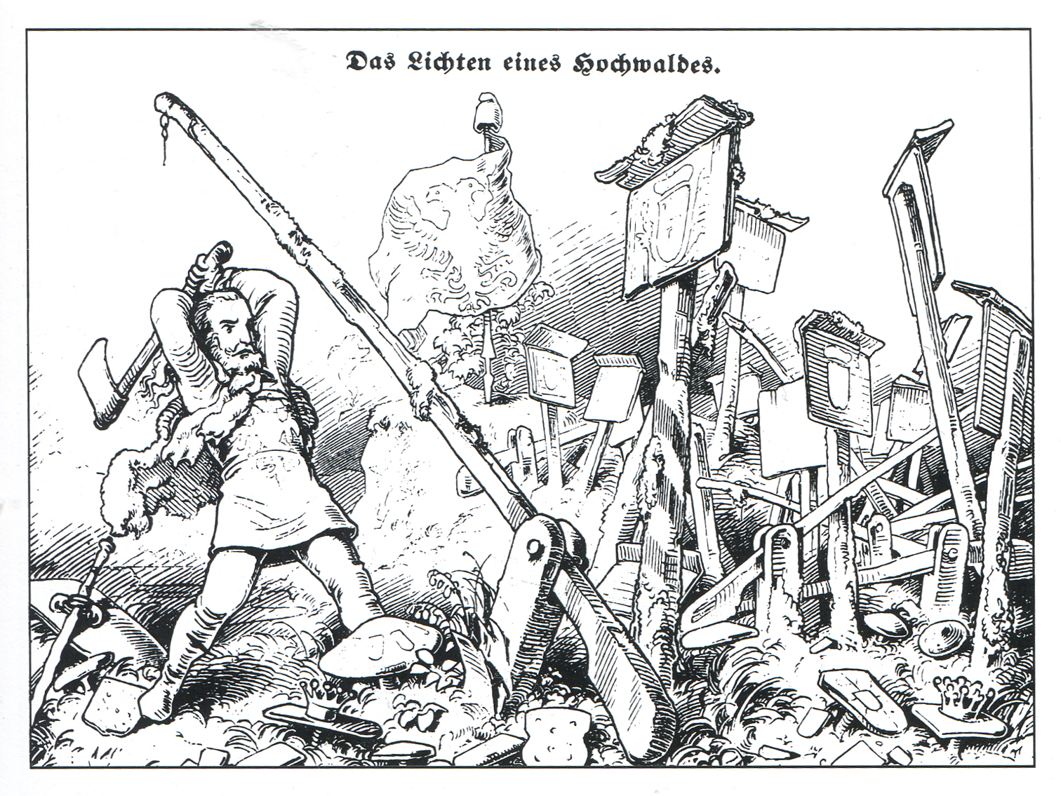 Чистка леса. Карикатура, посвящённая созданию Таможенного союза 1834 г.